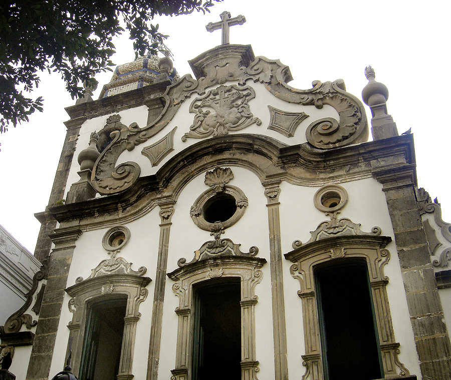 Detalhe da fachada da Igreja do Convento de Santo Antônio, em Recife, Brasil.